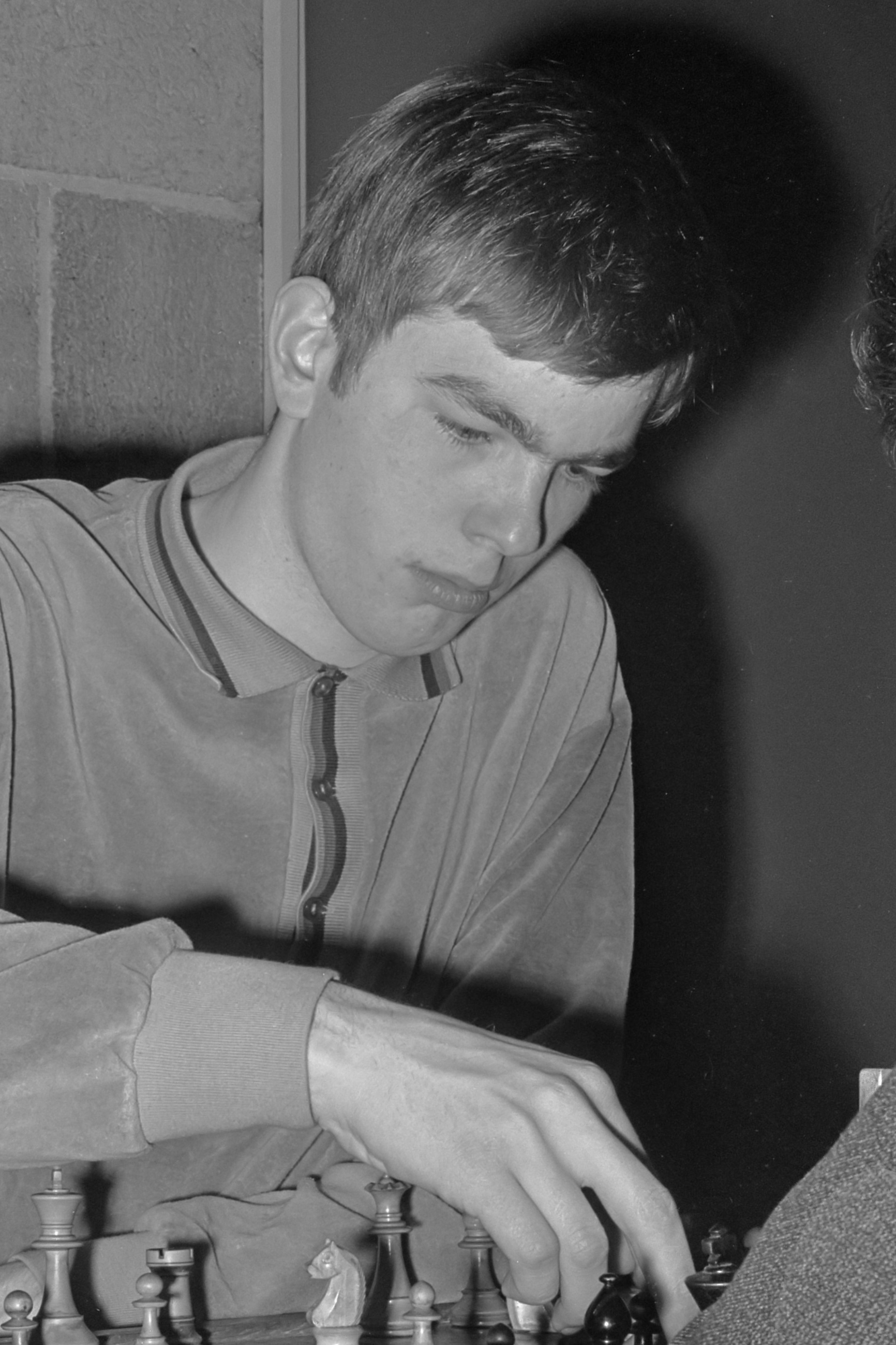 Nederlandse Jeugdkampioenschap Schaken te Amersfoort. H. Bohm 10 april 1968